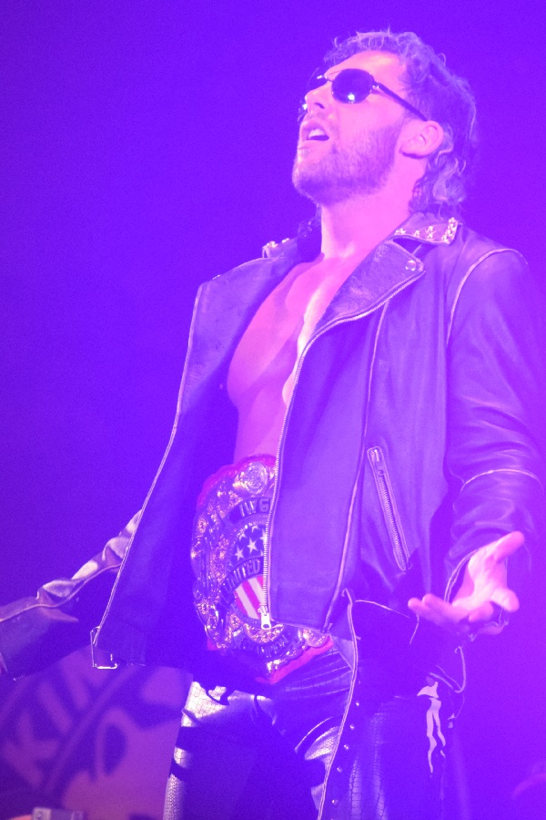 2017年11月5日 大阪府立体育会館「POWER STRUGGLE」 ケニー・オメガ